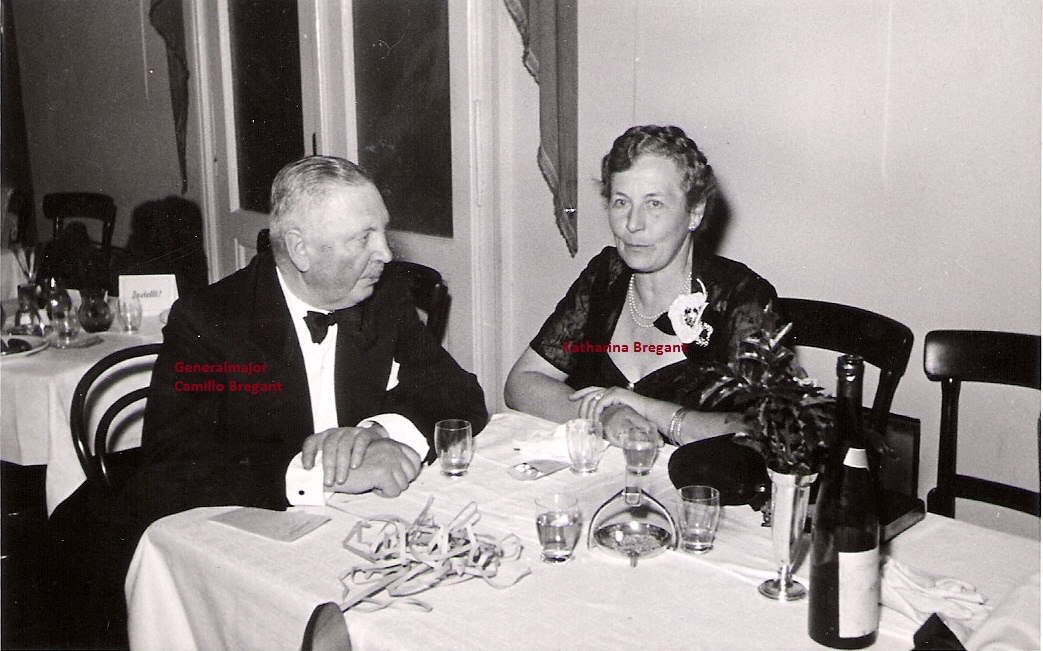 Katharina Bregant und Generalmajor Camillo Bregant